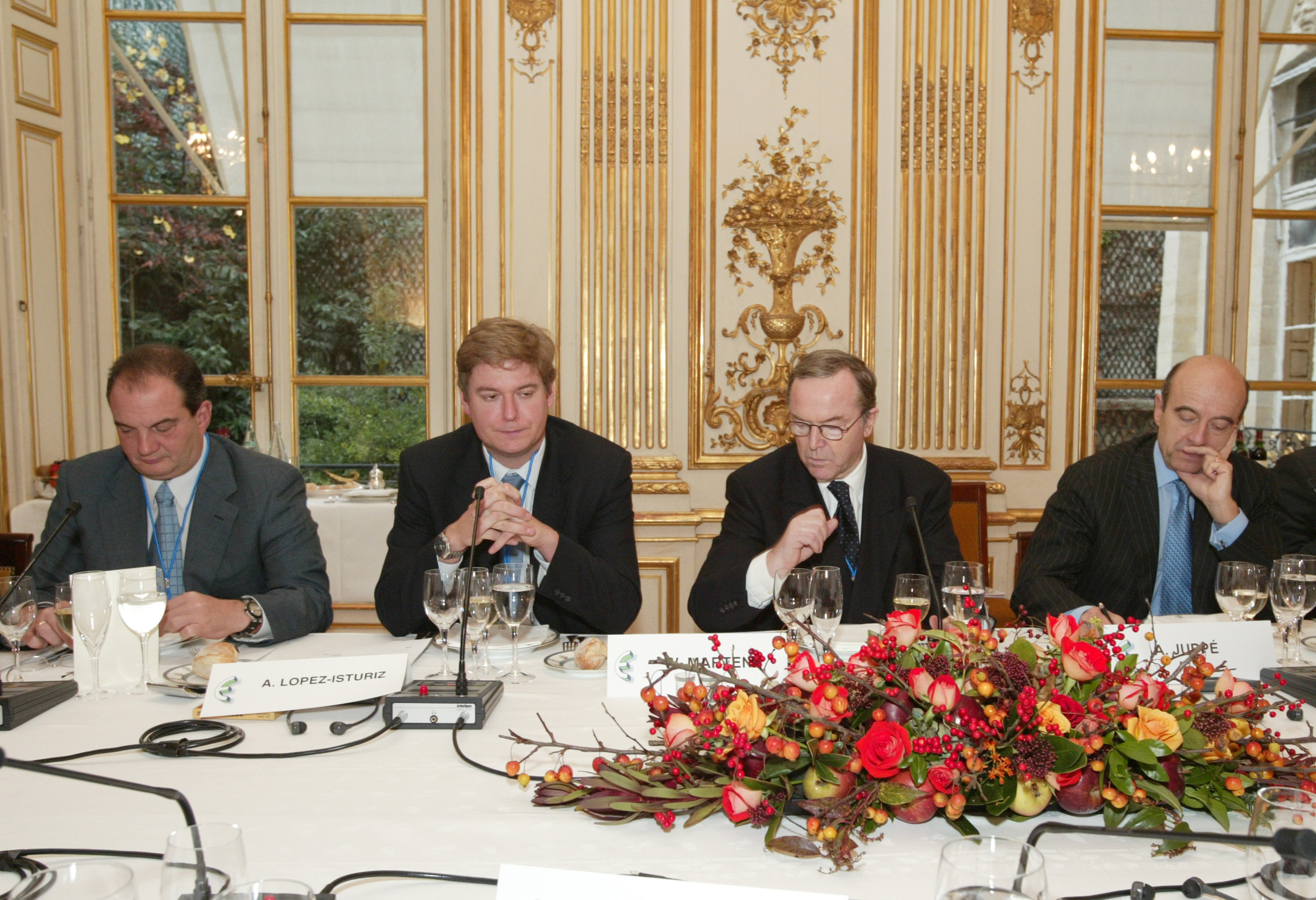 EPP Summit 4 December 2003 Paris